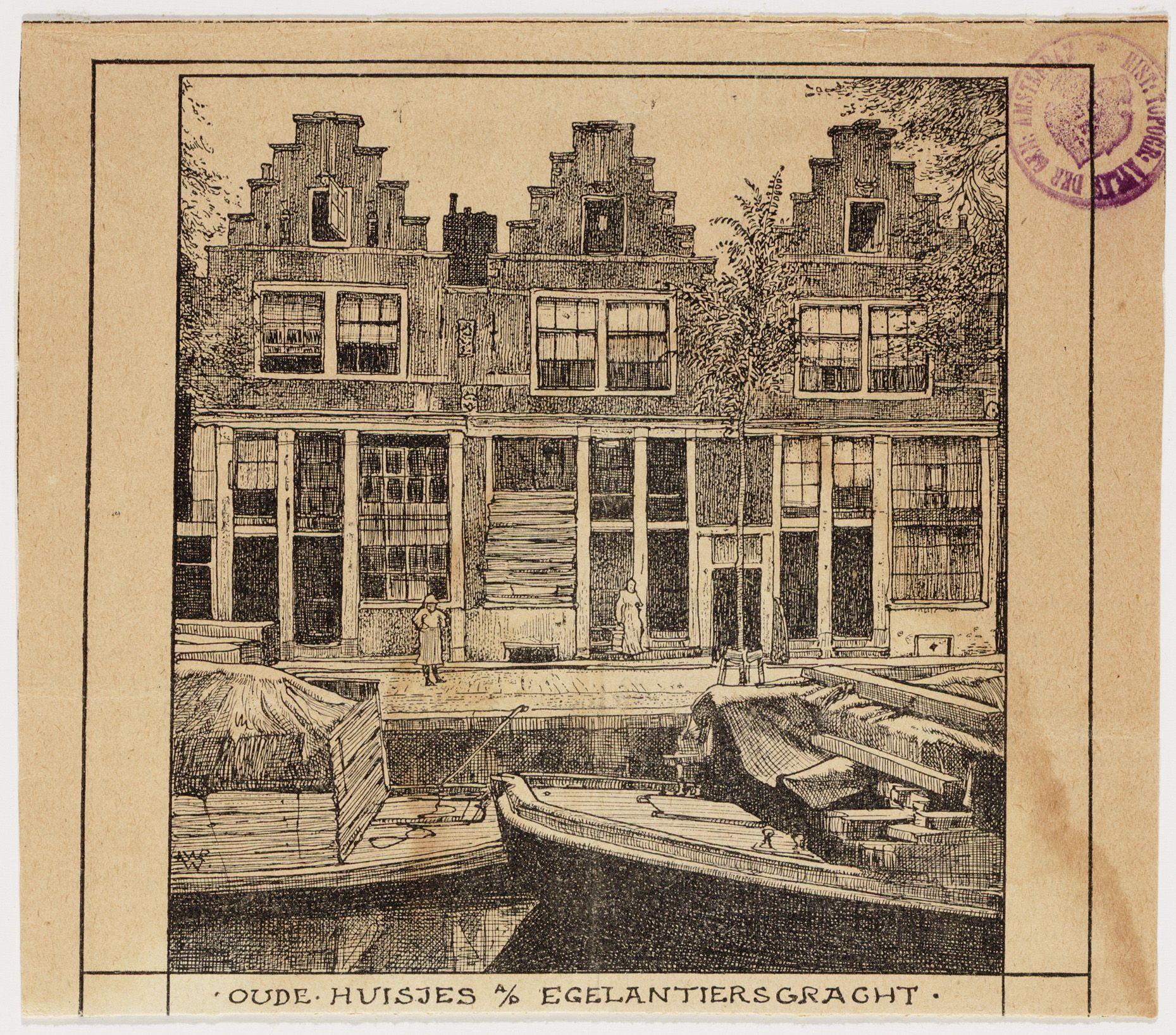 Beschrijving Egelantiersgracht 151-155 Voorgevels Documenttype prent Vervaardiger Wenckebach, L.W.R. Collectie Collectie Stadsarchief Amsterdam: los beeldmateriaal Datering 27 oktober 1907 Geografische naam Egelantiersgracht Inventarissen Afbeeldingsbestand 010194001375 Generated with Dememorixer